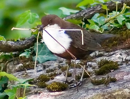 Mirlo acuático (Cinclus Cinclus). Imagen de Cesar Garcia Tapia